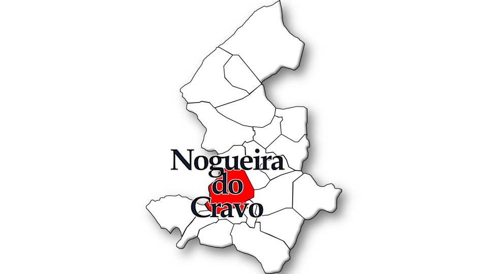 População